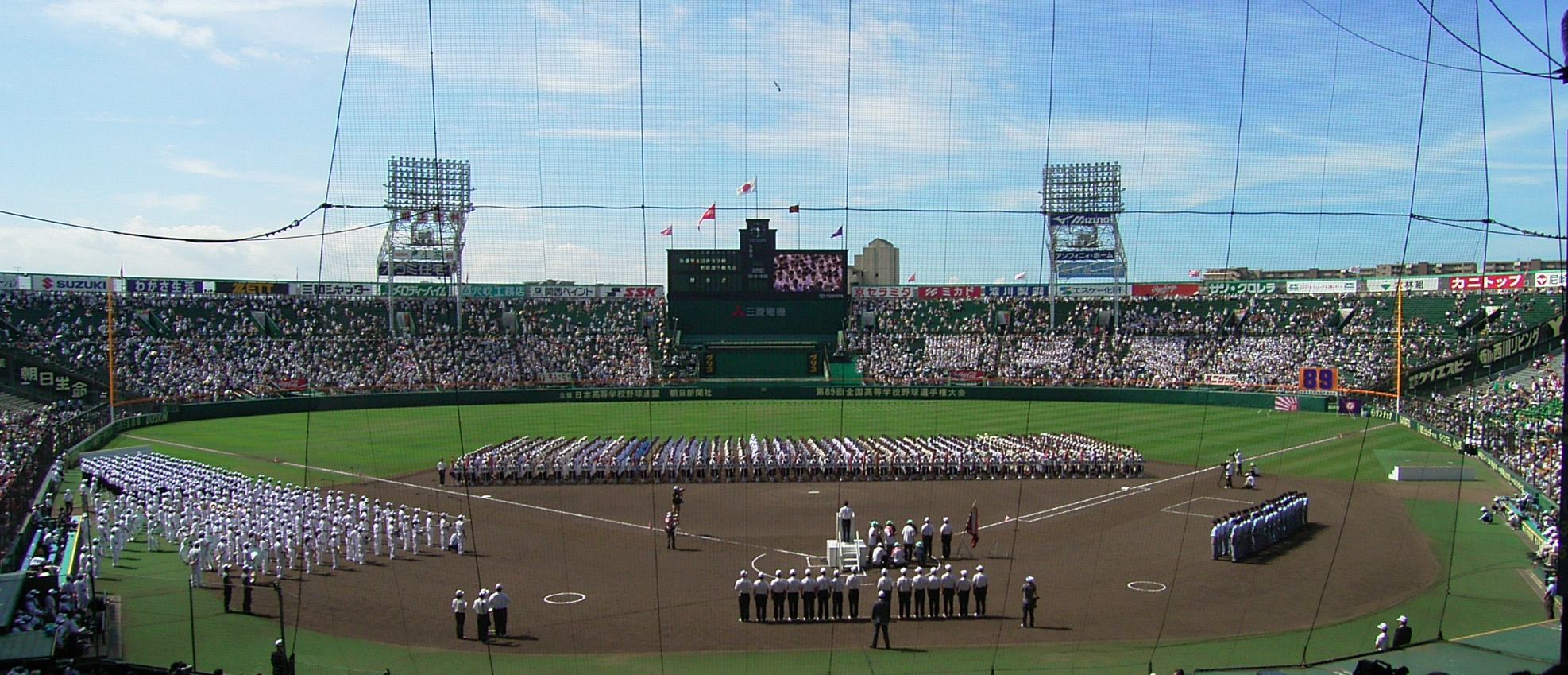 Hanshin Koshien Stadium